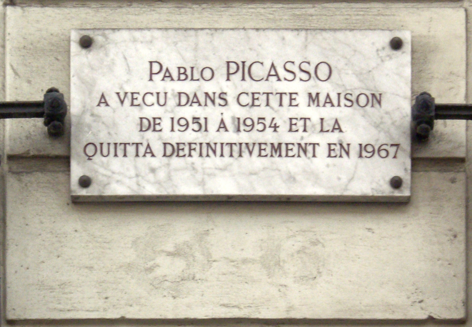 Plaque apposée au n° 9 de la rue Gay-Lussac, Paris 5e. « Pablo Picasso a vécu dans cette maison de 1951 à 1954 et la quitta définitivement en 1967. »